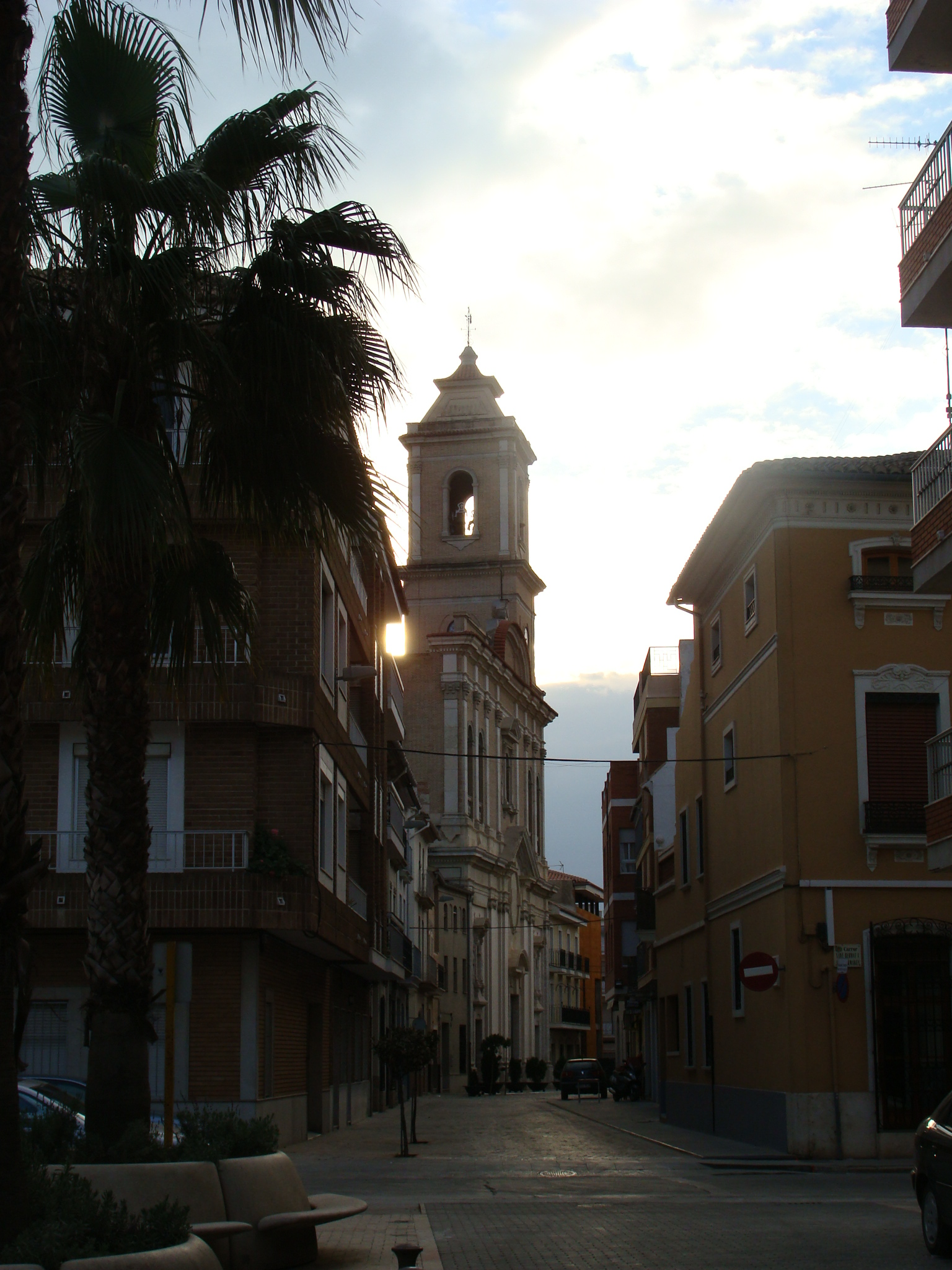 Iglesia